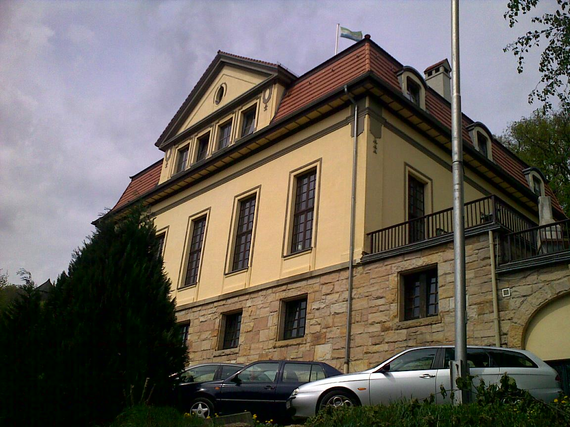 Corpshaus Hasso-Nassovia Marburg Gartenseite